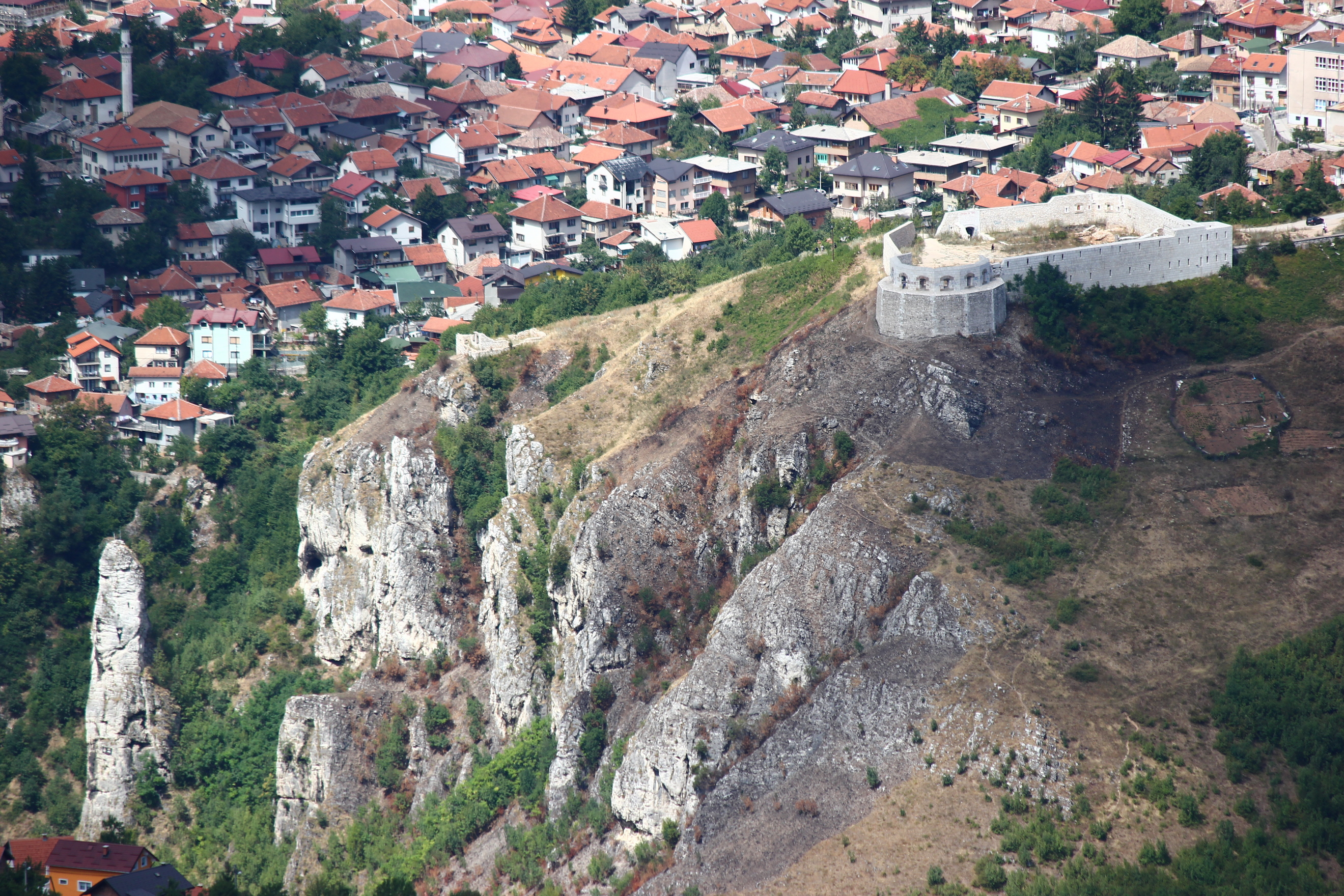 Die ehemalige Festung "Bijela Tabija" oberhalb der bosnischen Hauptstadt Sarajevo, gesehen vom Trebević.Hornjoserbsce: Něhdyša twjerdźizna "Bijela Tabija" wyše bosniskeje stolicy Sarajewa.